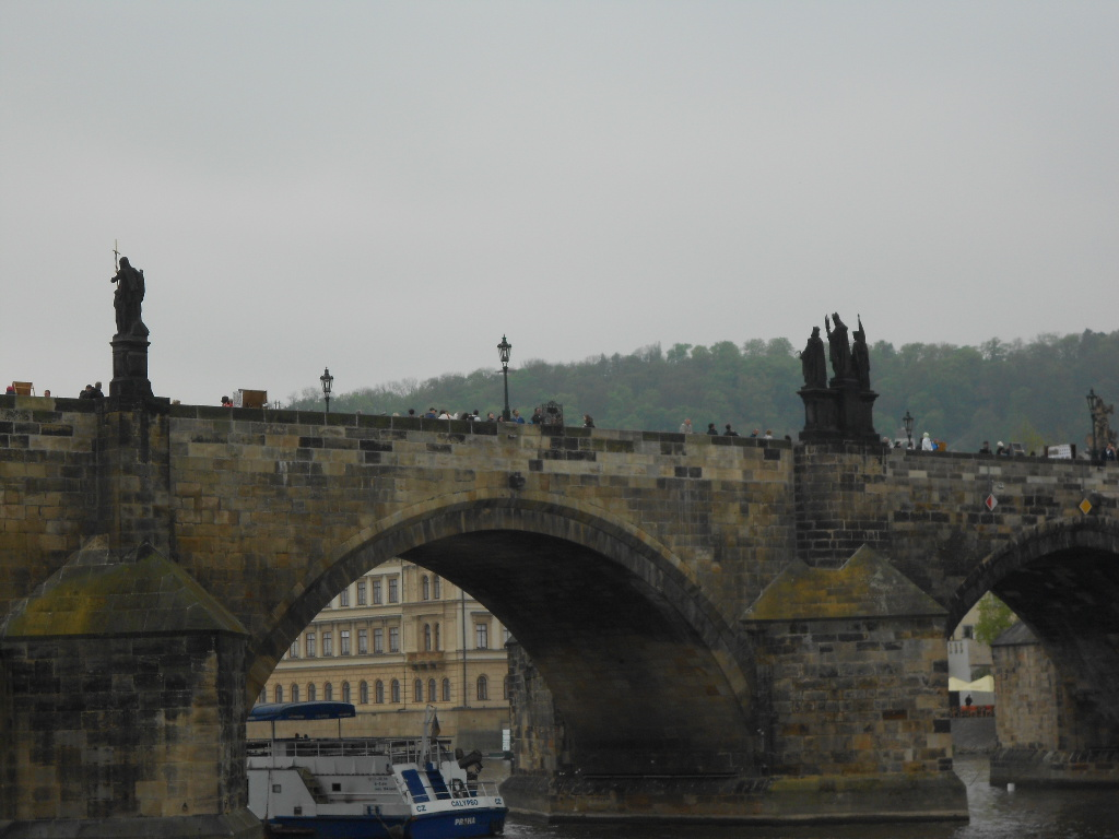 Sopstve na slika Dragan Cvetkovic, Snimak Karlovog mosta sa broda, Prag 2013. godina Licensing